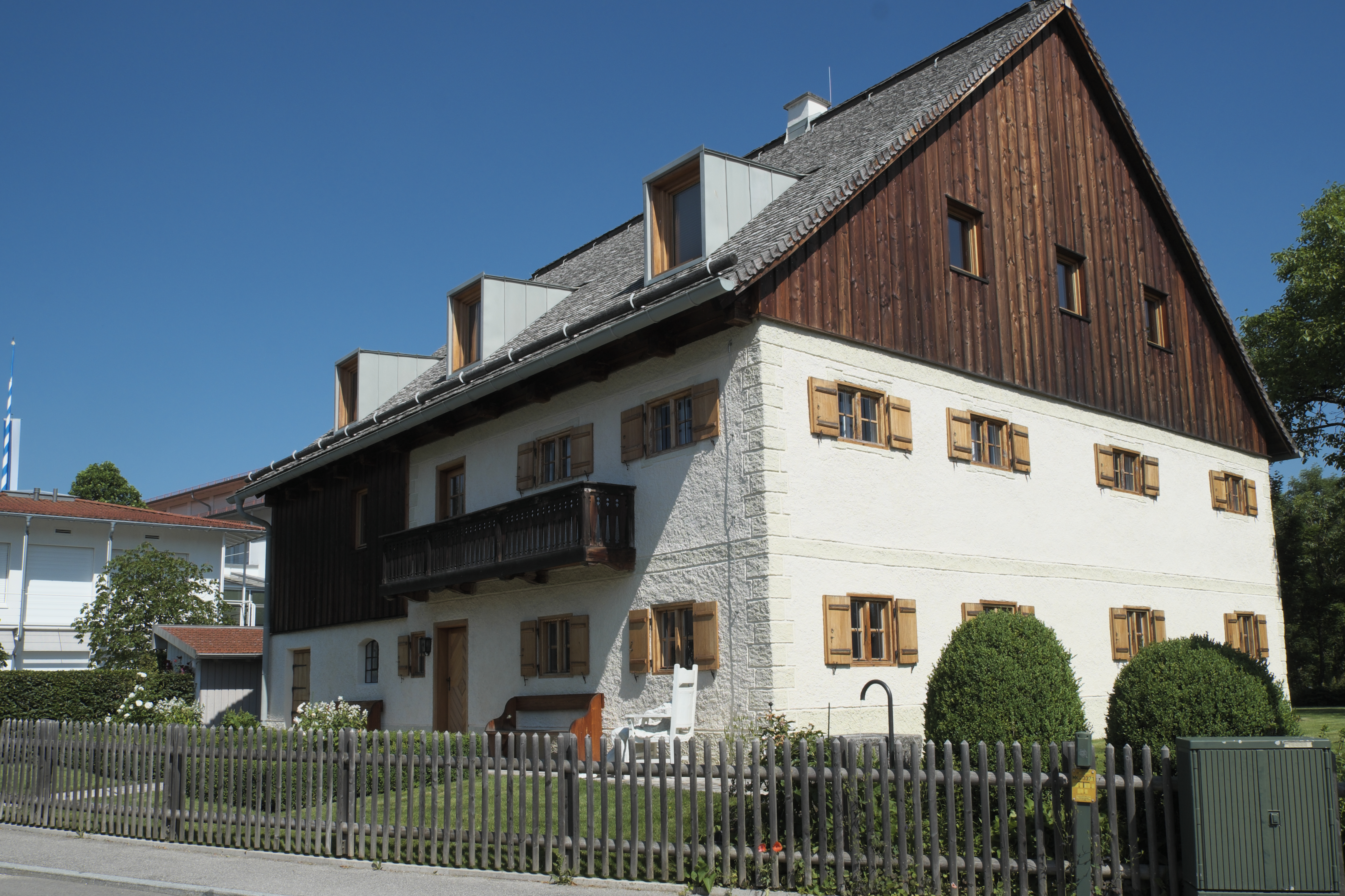 Ehemaliges Bauernhaus Beim Jäger in Baierbrunn im Landkreis München (Bayern, Deutschland)